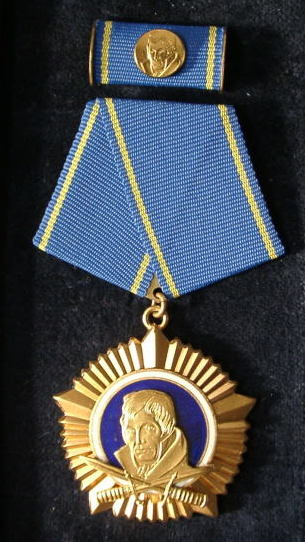 シャルンホルスト勲章